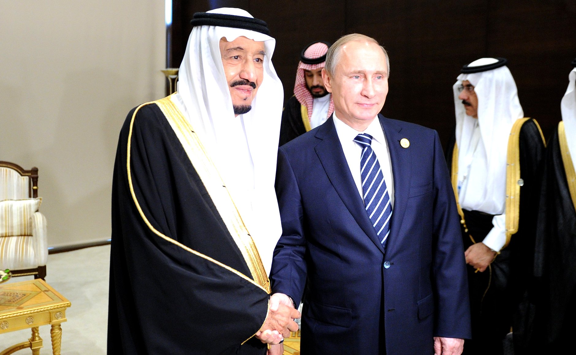 Встреча Президента России Владимира Путина с Королём Саудовской Аравии Сальманом Бен Абдель Азизом Аль Саудом